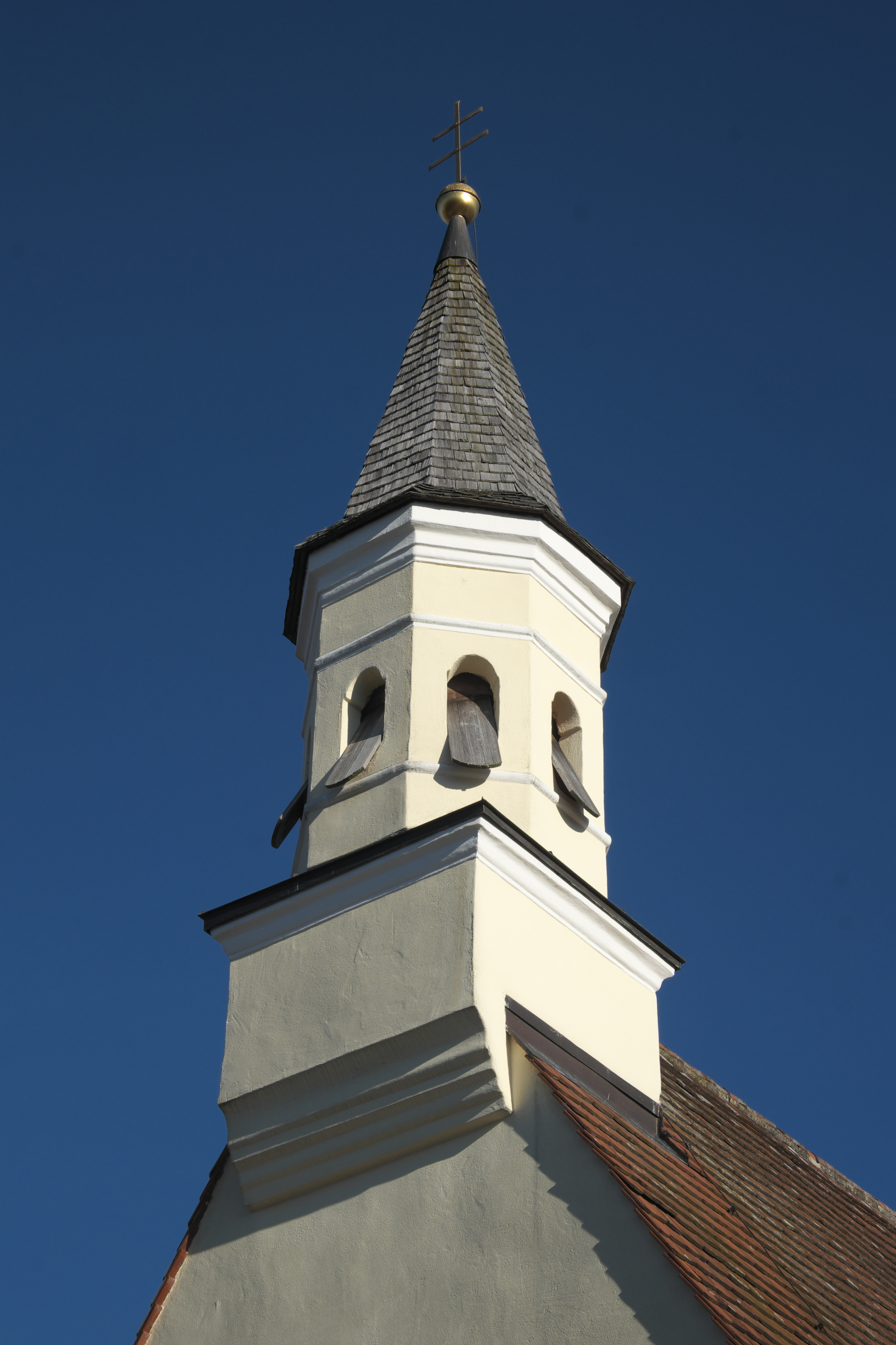 Katholische Filialkirche der Unschuldigen Kinder in Essenbach (Odelzhausen) im Landkreis Dachau (Bayern/Deutschland), Dachreiter